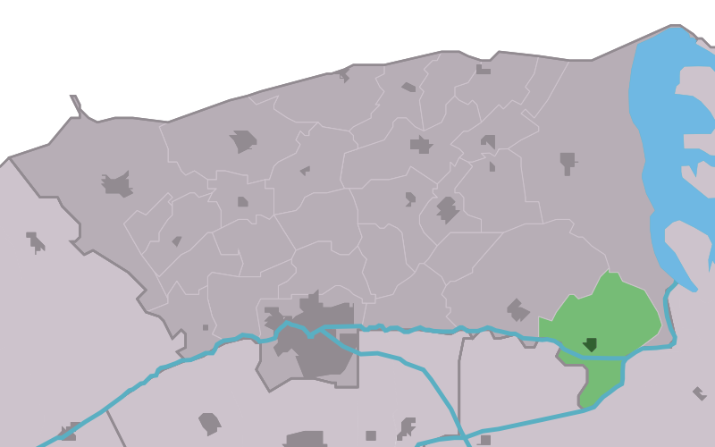 Kaartsje fan himrik fan Ingwierrum